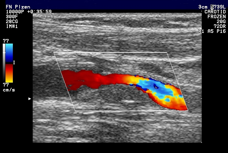 barevný Doppler stenózy vnitřní karotidy